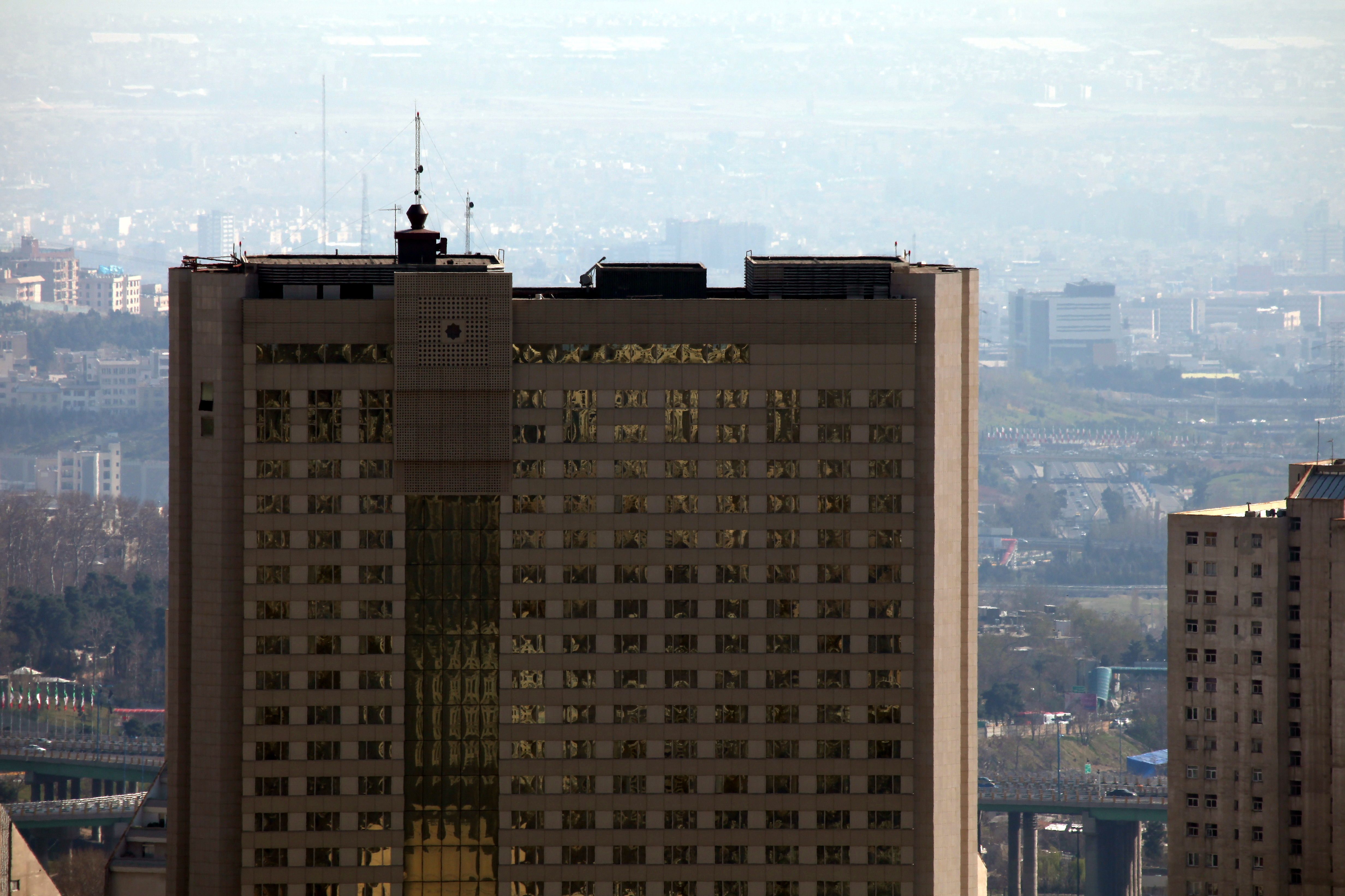 Hotel Parsian Azadi (Hyatt)